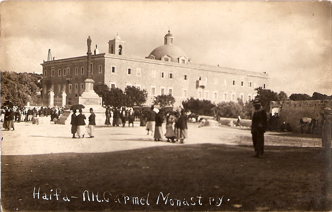 mt. Carmel, Haifa